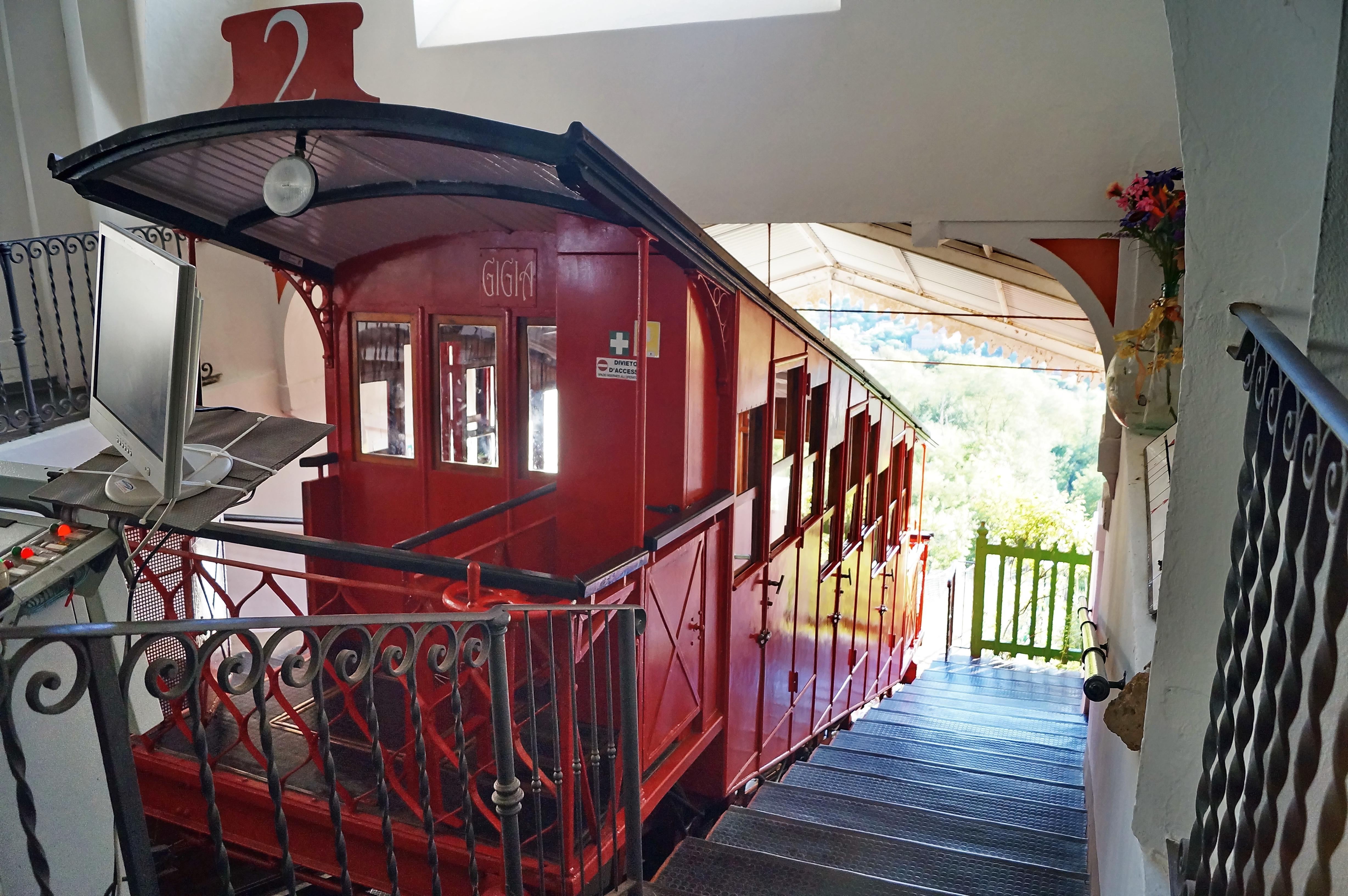 Funicolare di Montecatini Terme This is a photo of a monument which is part of cultural heritage of Italy.